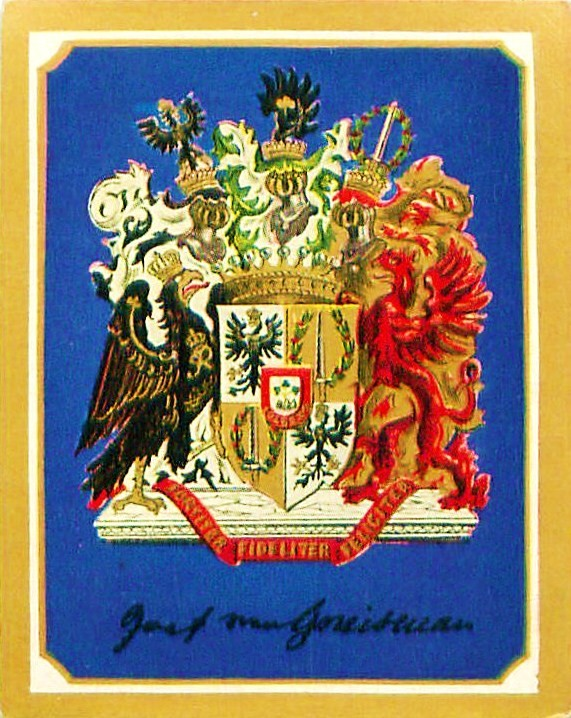 Gräfliches Wappen Neidhardt von Gneisenau